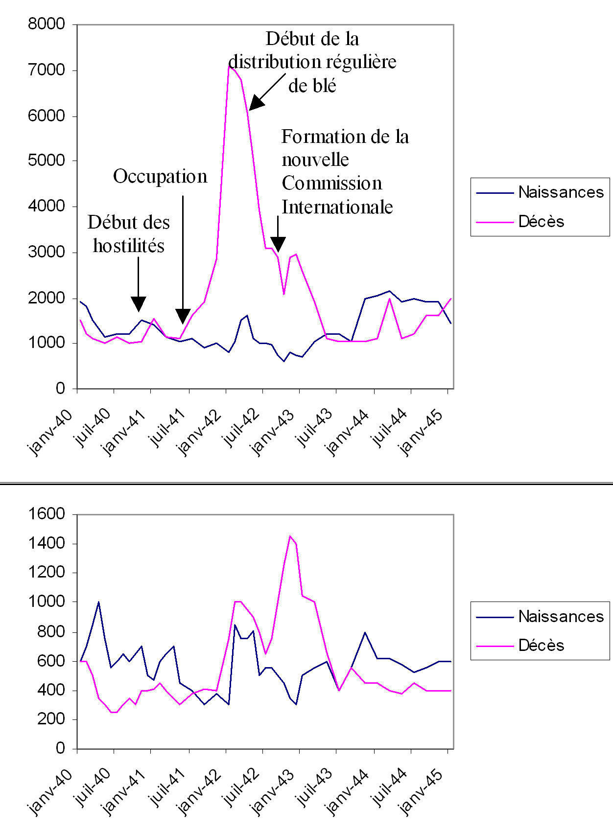 taux de natalité et de mortalité a Athènes (graphique du haut) et en MAcédoine (graphique du bas) entre 1940 et 1944. Source: Inspiré de Mark Mazower, Dans la Grèce d'Hitler.